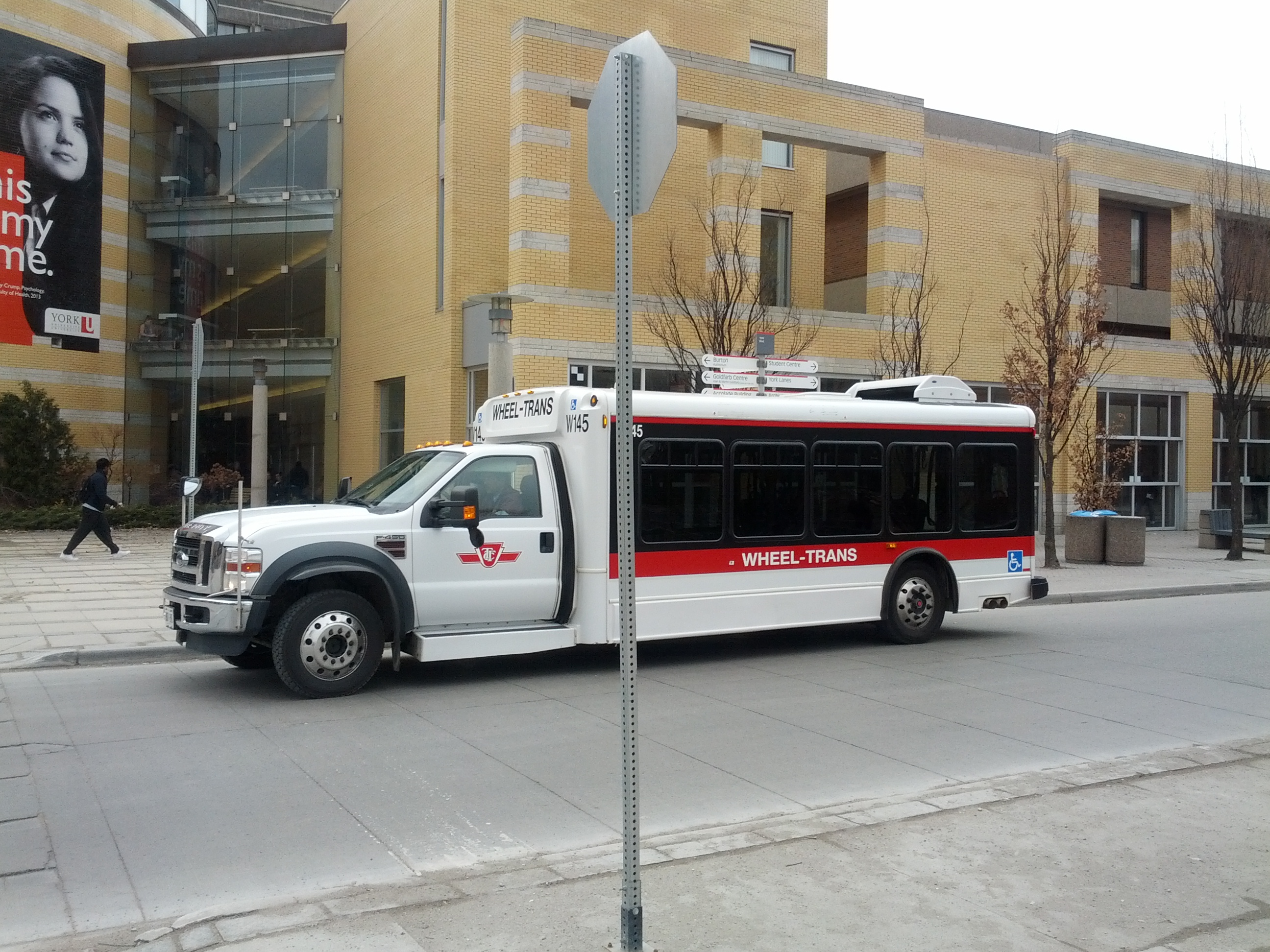 Ônibus para cadeirantes na York University.